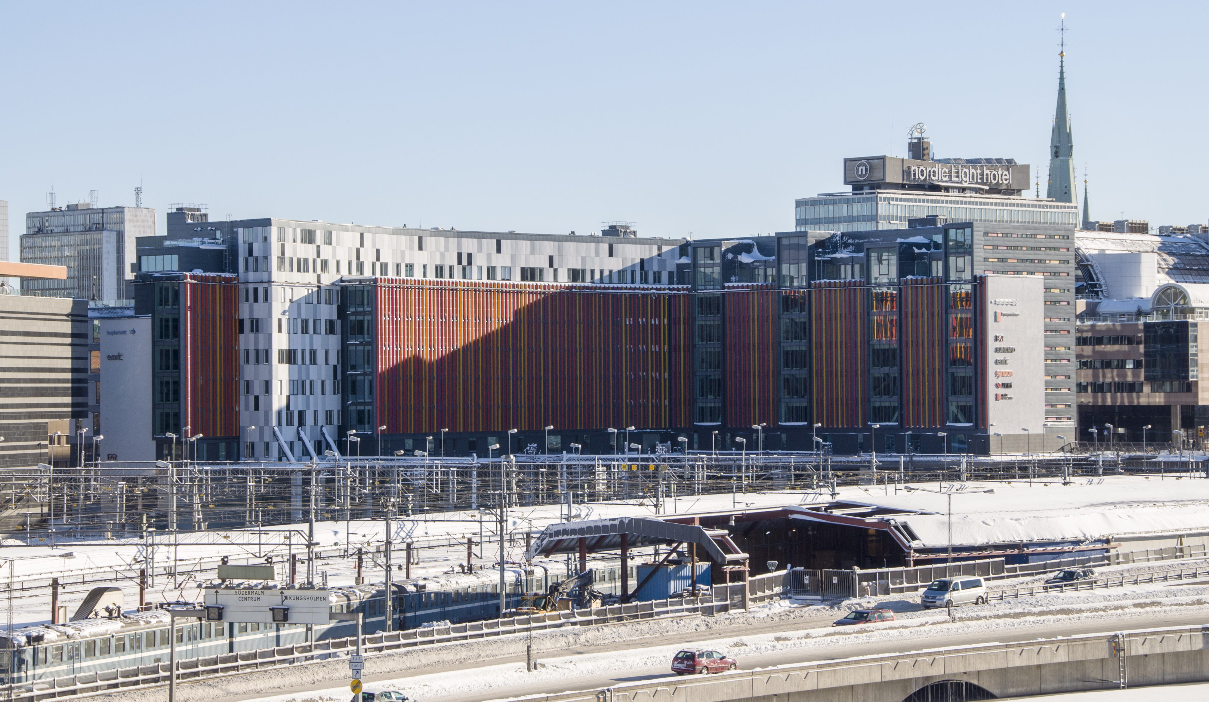 Mentorn 1, Kungsbron Byggnadsår 2009 . Arkitekter Wester + Elsner Arkitekter.